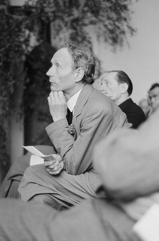 Original image description from the Deutsche Fotothek Portrait Heinz Eberhard Strünings im Auditorium